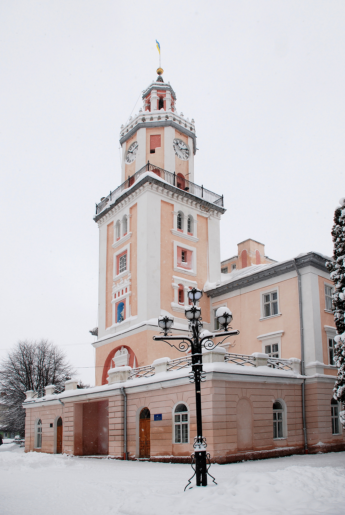 Ратуша (мур.), Самбір, пл.Ринок, 1